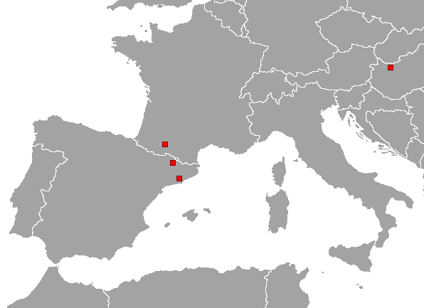 Distribución de los principales hallazgos de dryopithecus en Europa.